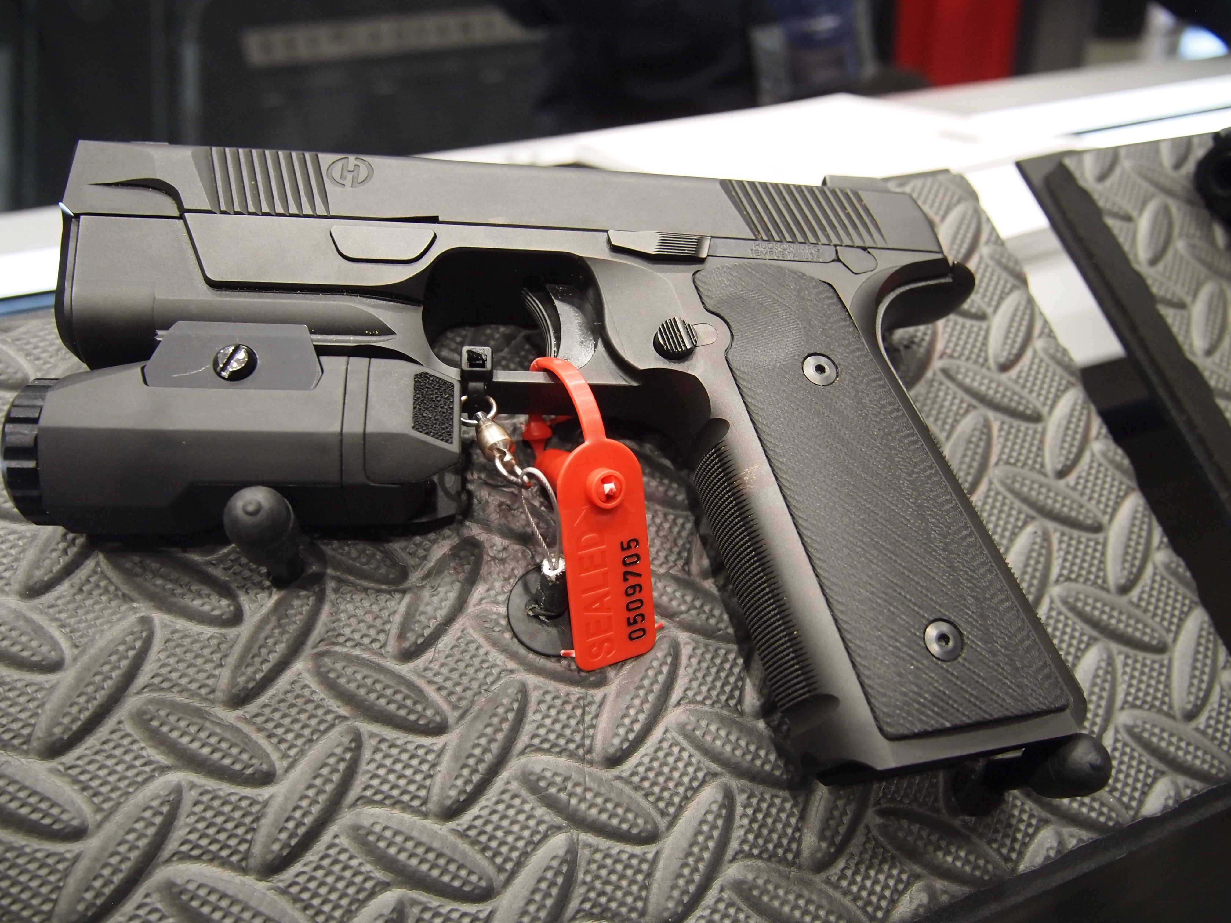 Hudson H9 pistol.